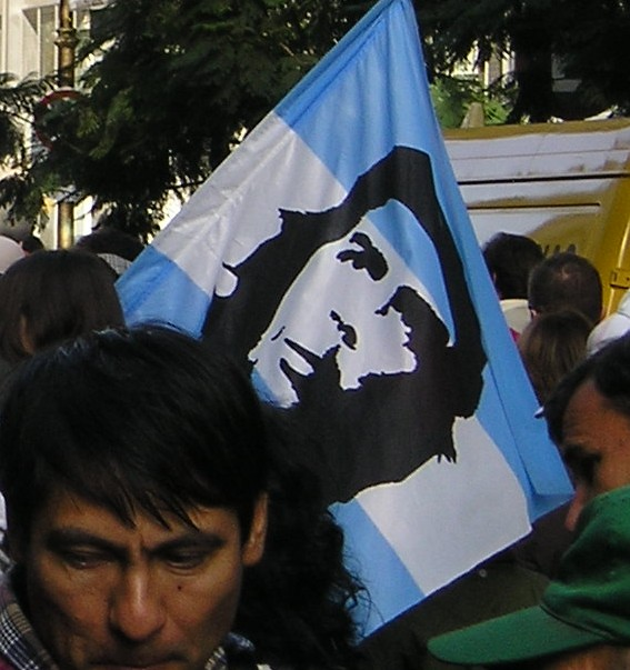 Manifestación. Bandera con imagen del Che Guevara. Argentina.